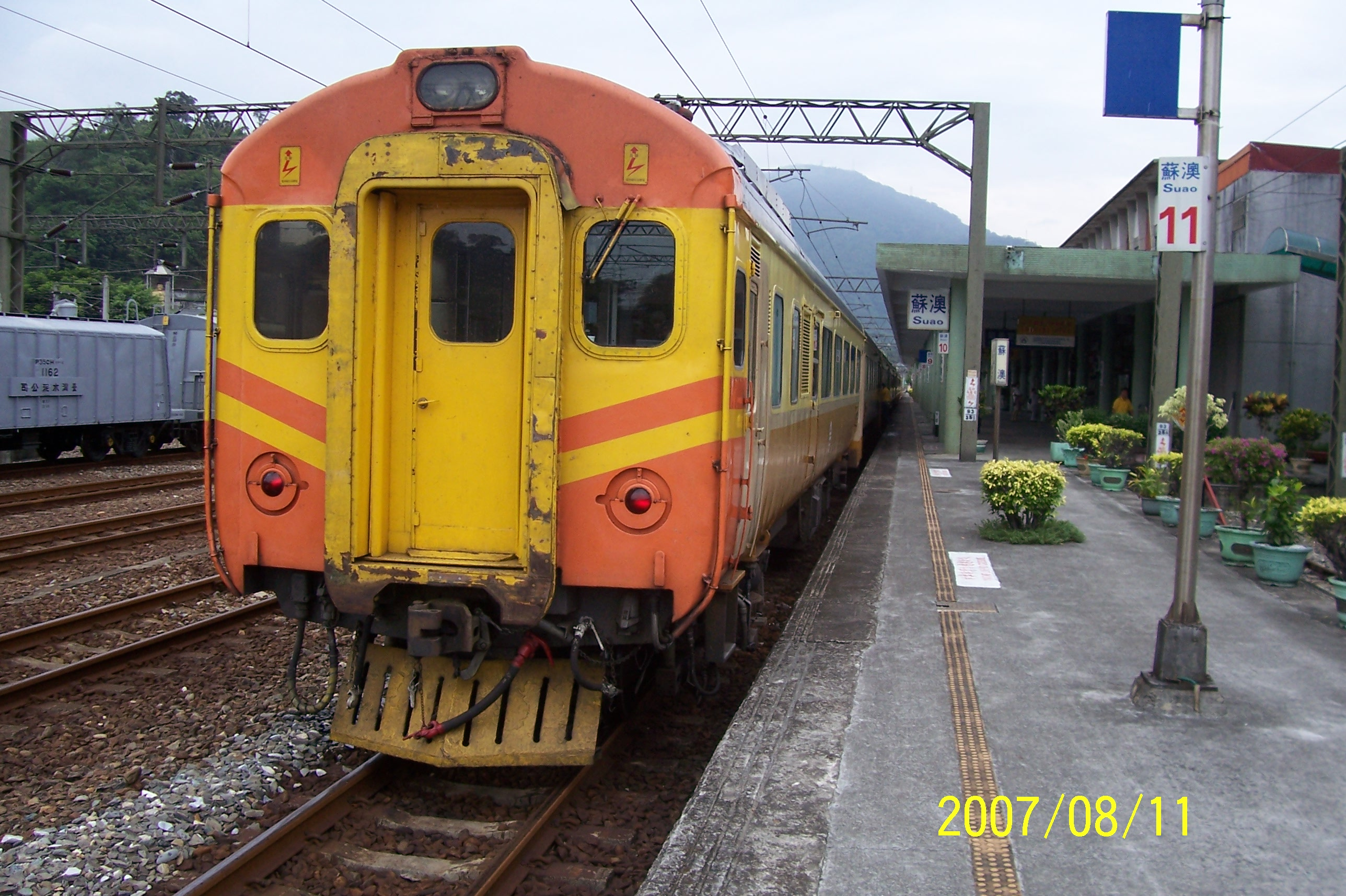 1085次EMU100型自強號停在蘇澳車站第一月臺。 原出處:自己 日期:2007/10/30 作者:蔡詠任 版權許可資料:此圖片為本人版權所有 但我將此圖片上傳至維基百科與人分享。